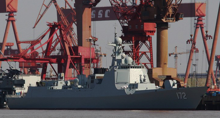 中文（中国大陆）: 停靠在江南造船厂边的“昆明”号导弹驱逐舰